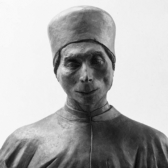 Italian, Pisa; Bust; Sculpture